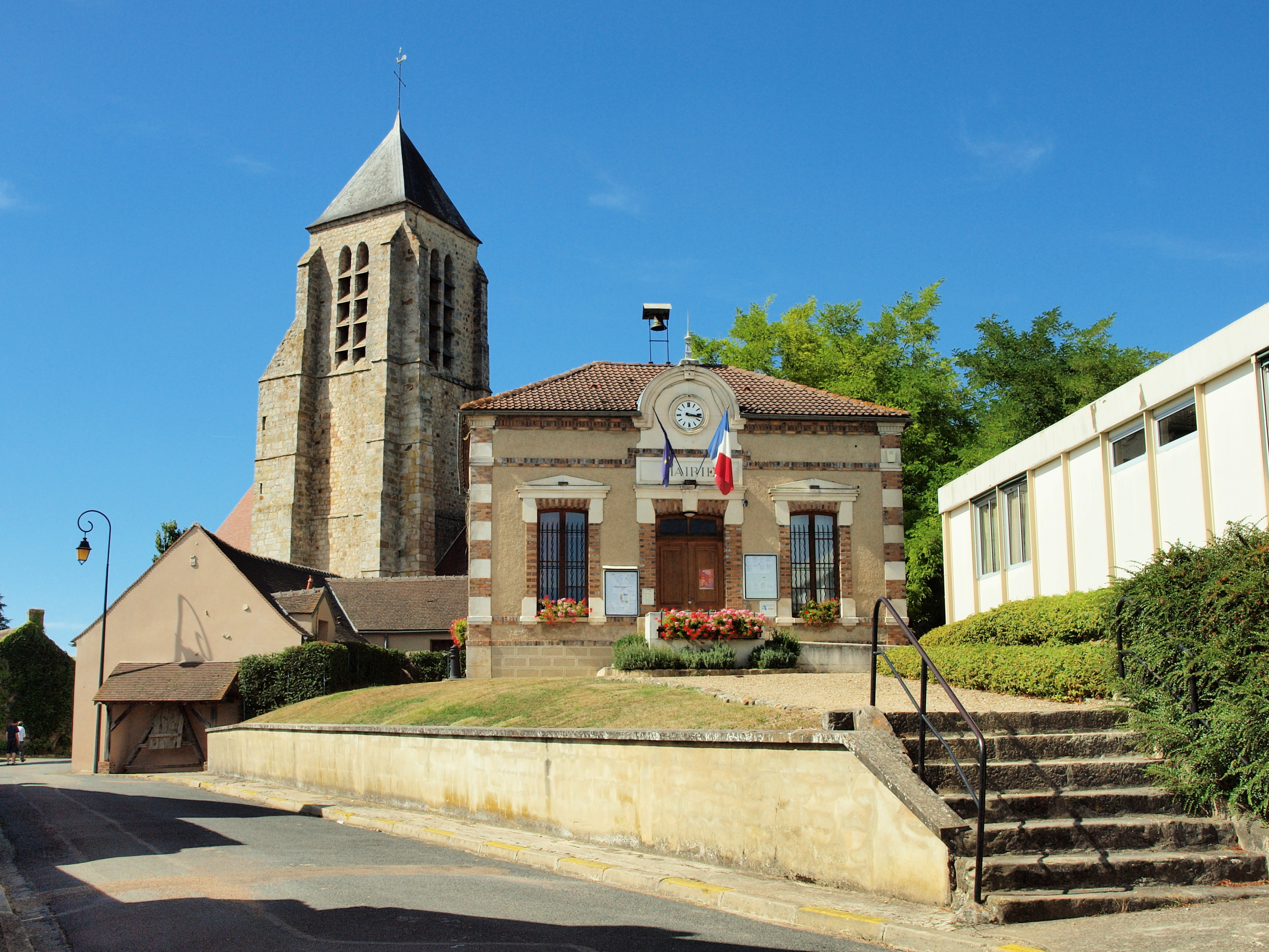 Mairie & église Notre-Dame de Chaumont (Yonne, France)